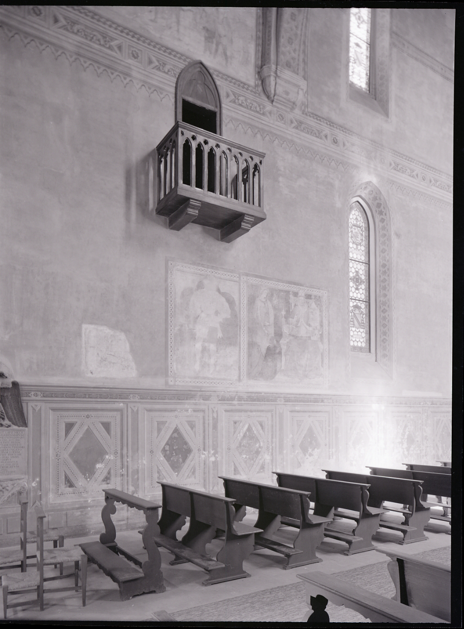 Servizio fotografico : Bologna, 1970 / Paolo Monti. - Buste: 8, Fototipi: 8 : Negativo b/n, gelatina bromuro d'argento/ pellicola ; 10x12. - ((Serie costituita da 8 negativi identificati con i nn.: 16031-13035. La suddetta serie è contenuta nella scatola identificata con la numerazione 16001-16500G. - Occasione: Documentazione della mostra sulla campagna di rilevamento del centro storico del comune di Bologna, presso Palazzo D'Accursio voluta da Cervellati e punto di partenza per le campagne successive di ricognizione del territorio. - Fonte: Fattura di Paolo Monti: IV. Commesse/ Fattura (1969/05/09), presso Archivio Paolo Monti. - Fonte: Fattura di Paolo Monti: IV. Commesse/ Fattura (1969/07/31), presso Archivio Paolo Monti